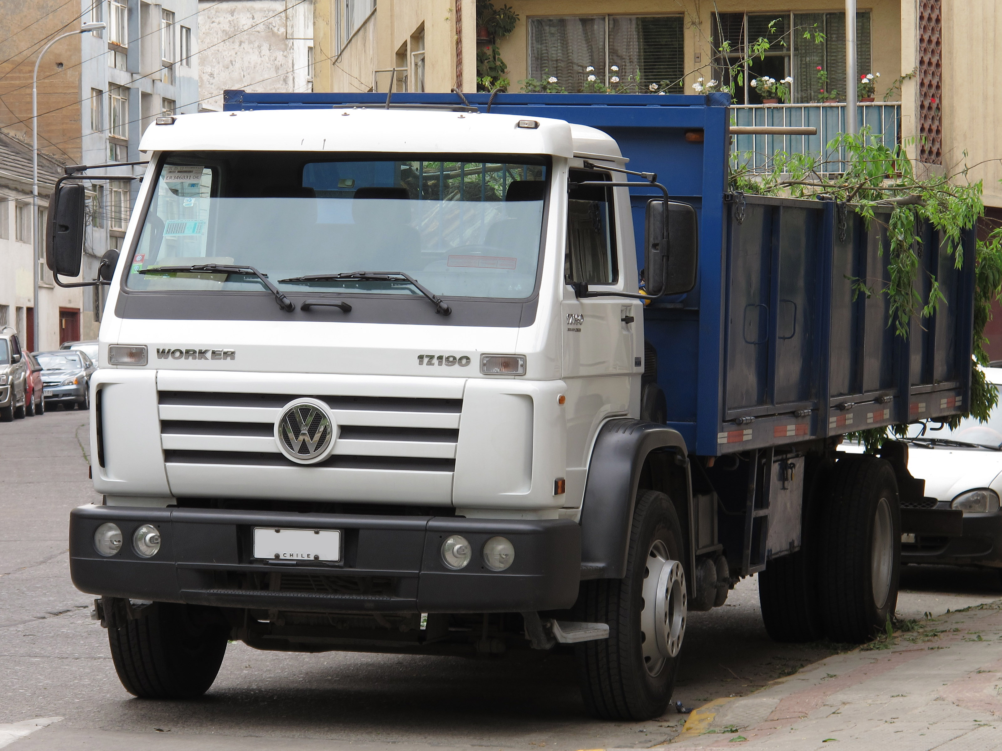 Volkswagen 17-190 Worker 2014